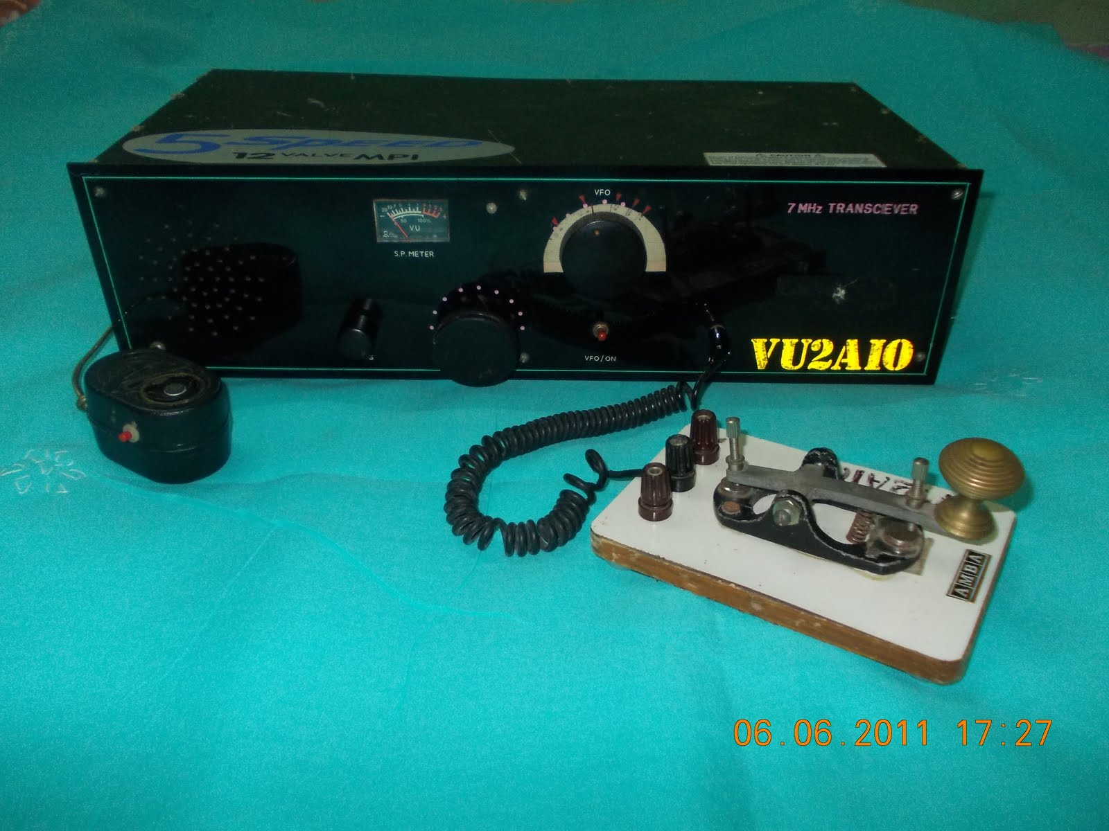 സ്വന്തമായി നിര്‍മ്മിച്ച ഹാം റേഡിയോ ഉപകരണം.